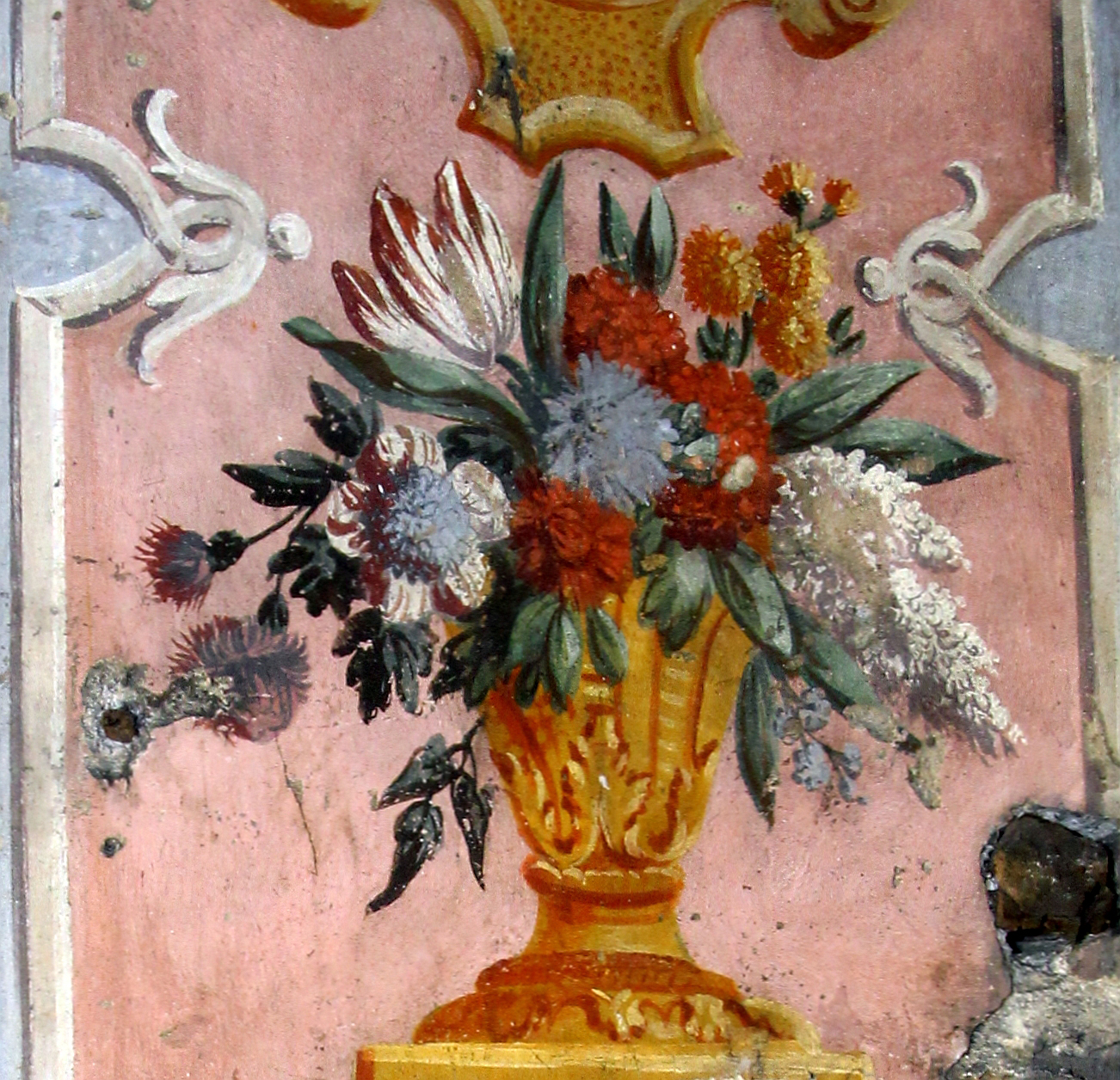 Gotha, Amtshaus, Details Fresko